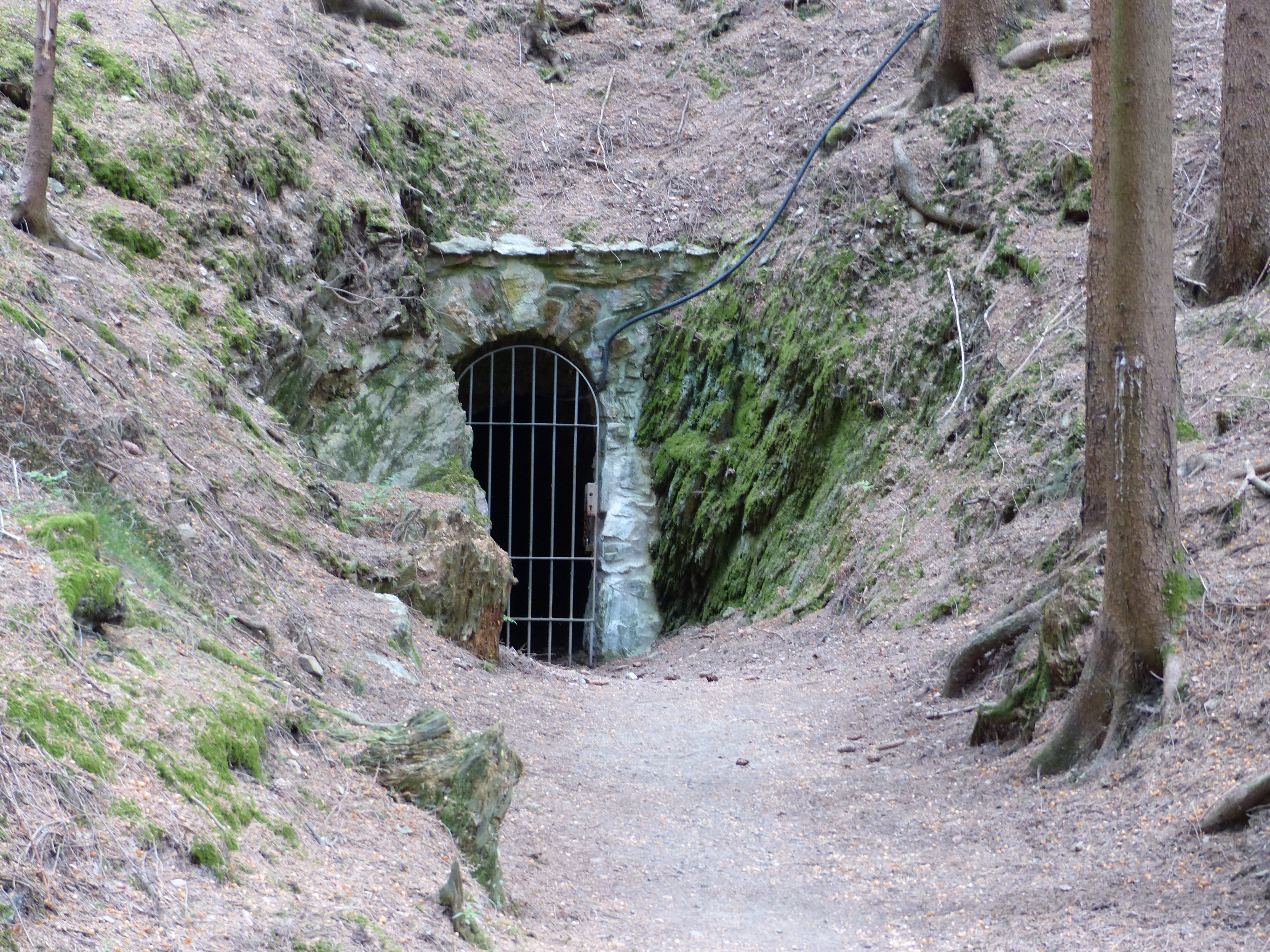 Ansicht von Goldkronach